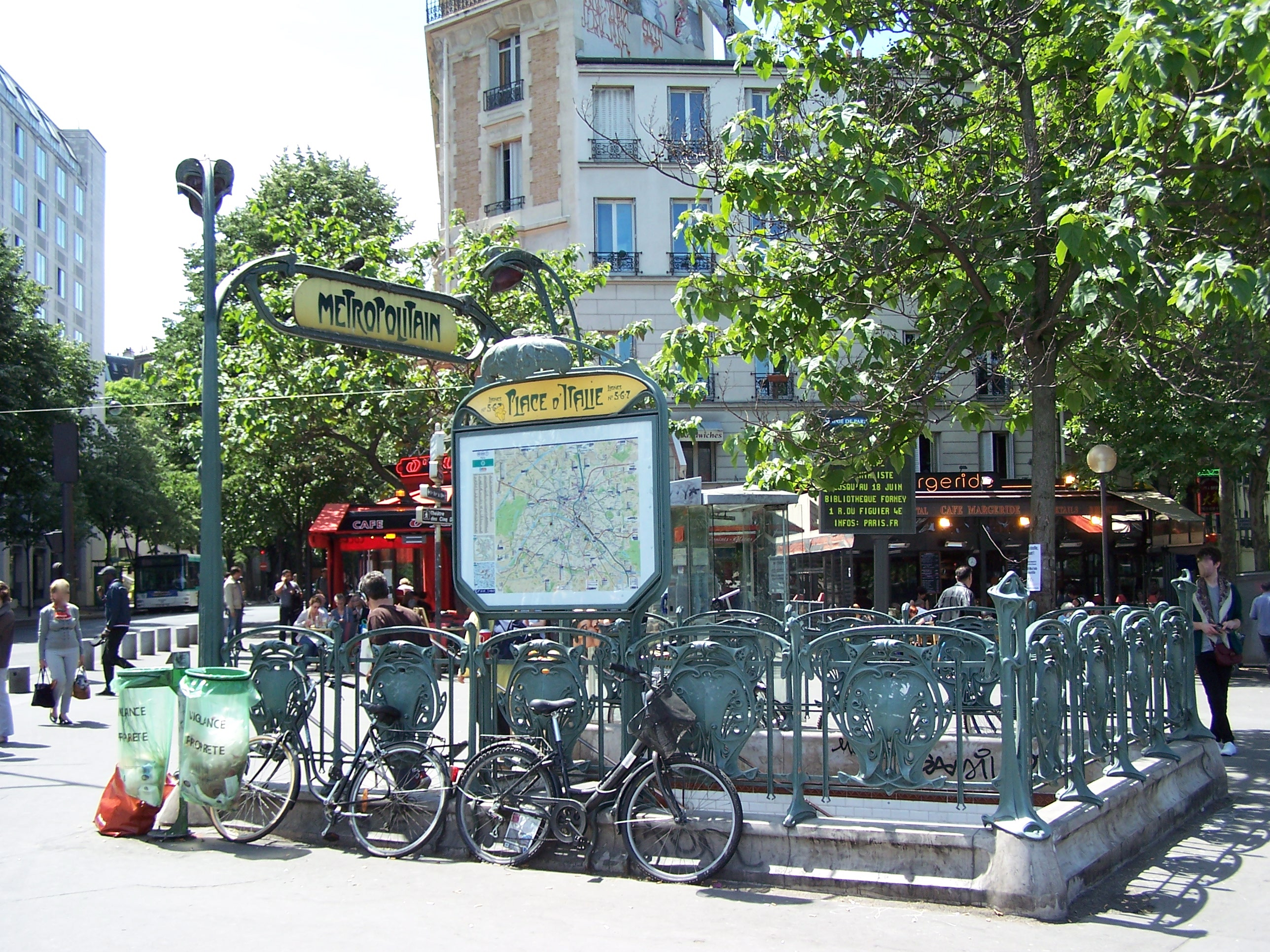 Édicule de la station de métro Place d'Italie, classé aux monuments historiques